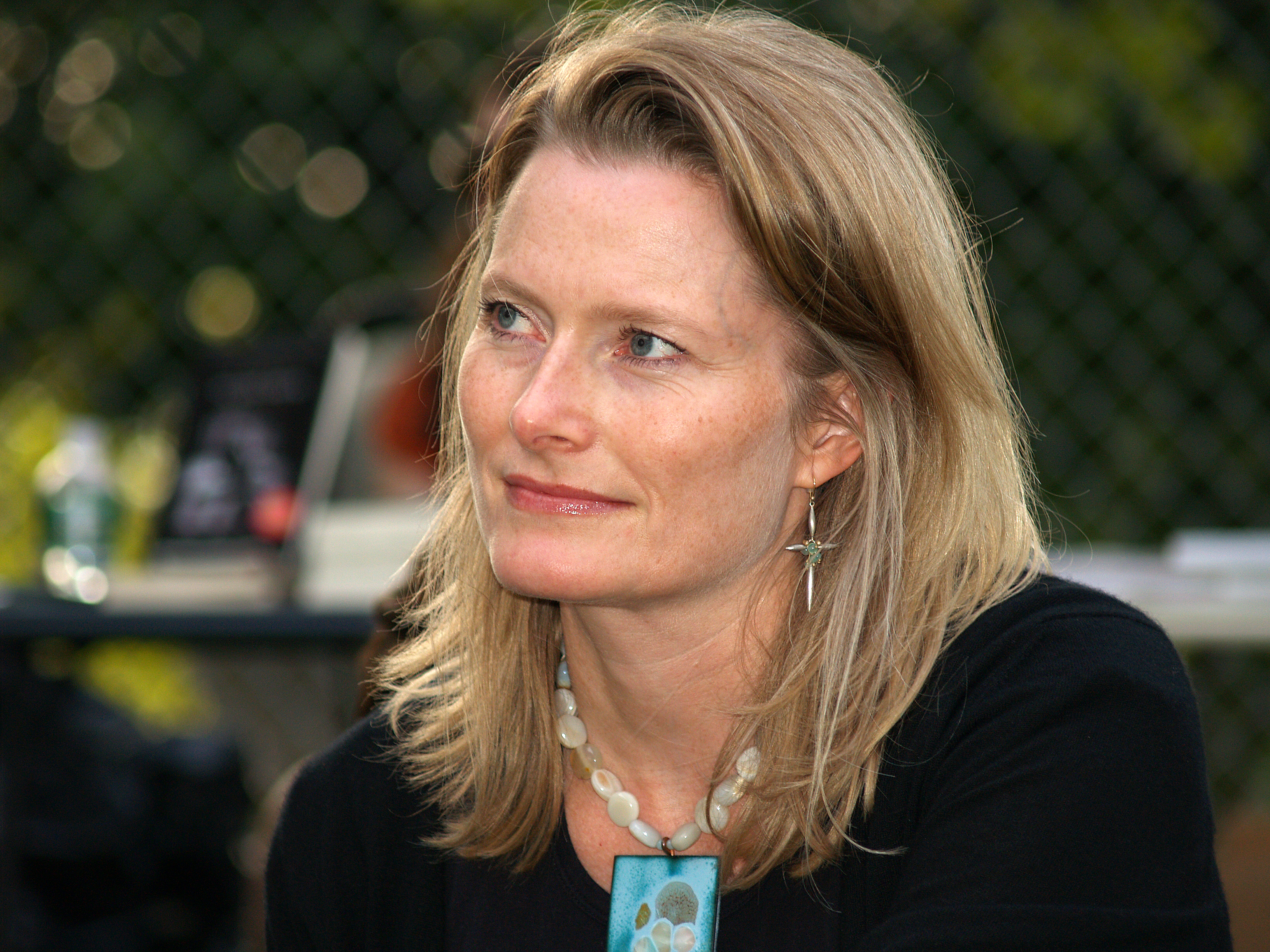 Jennifer Egan